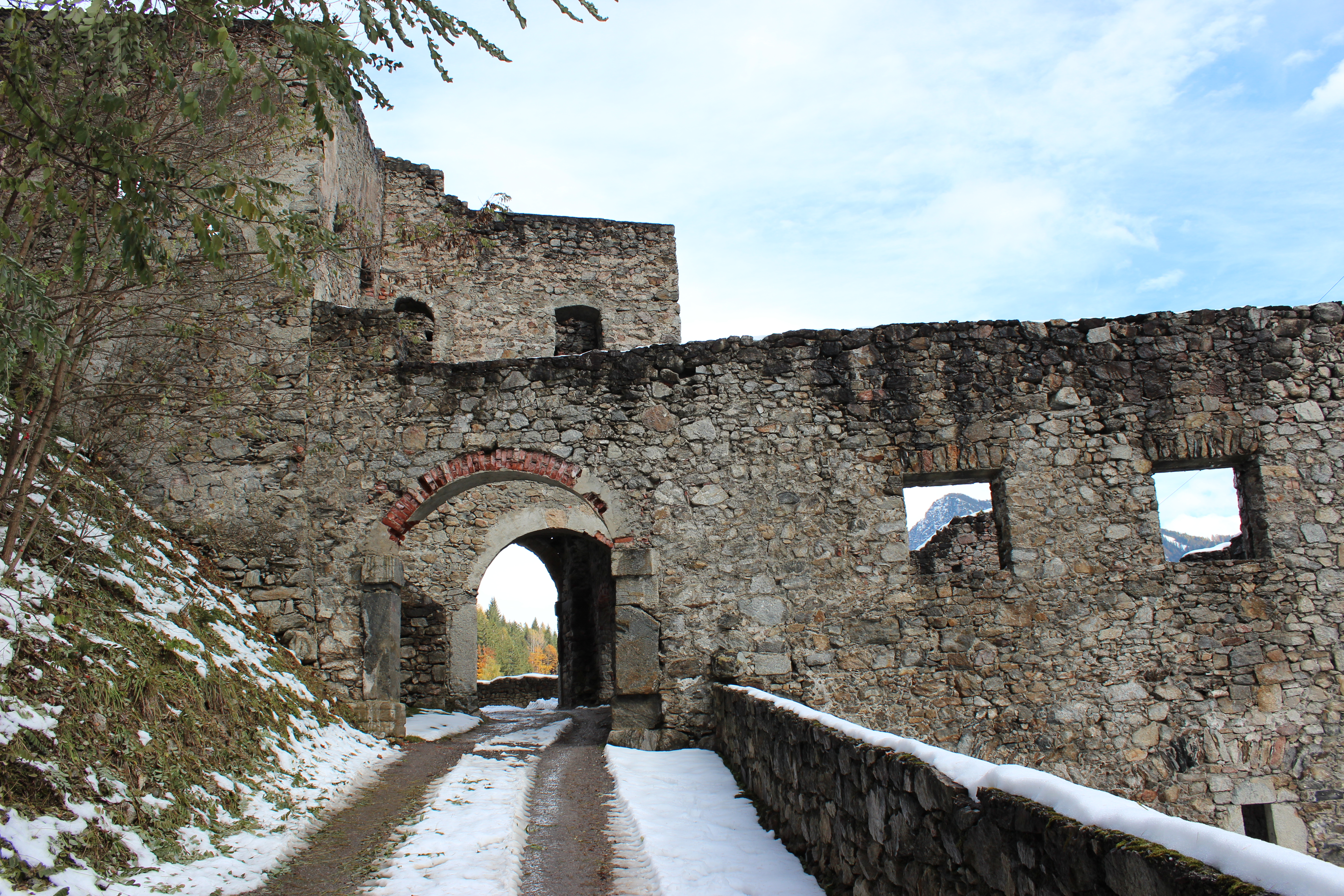 Festungsanlage Lienzer-Klause in Leisach.